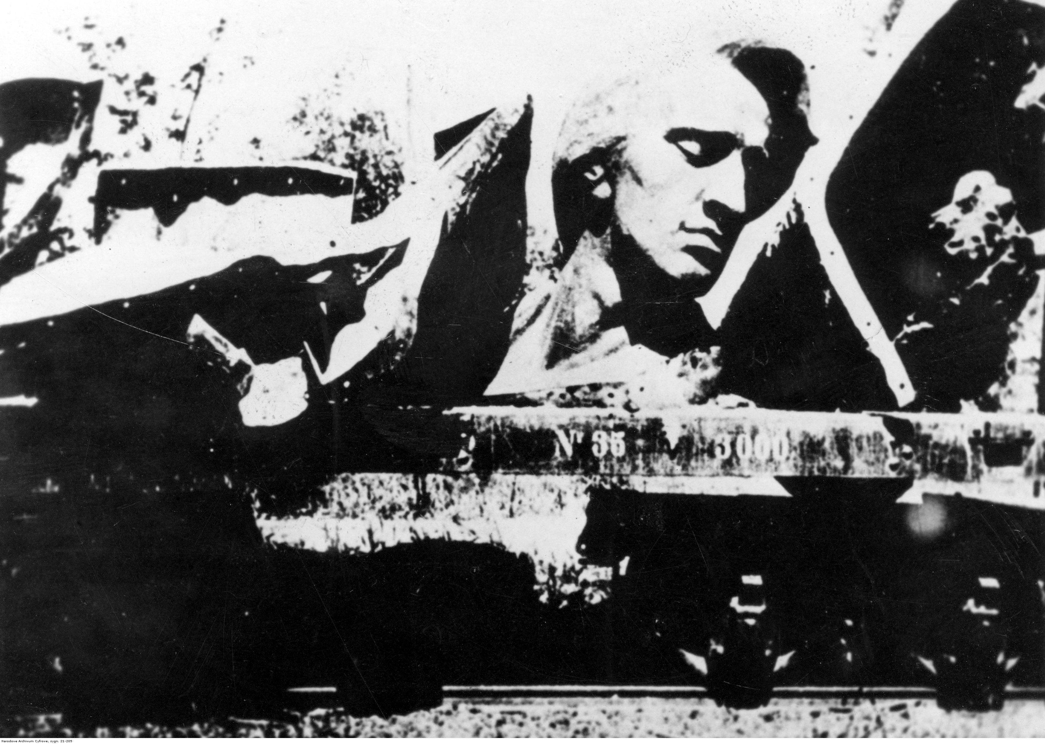 Pomnik Fryderyka Chopina w Warszawie zniszczony przez Niemców. Widok ogólny zniszczonego pomnika.